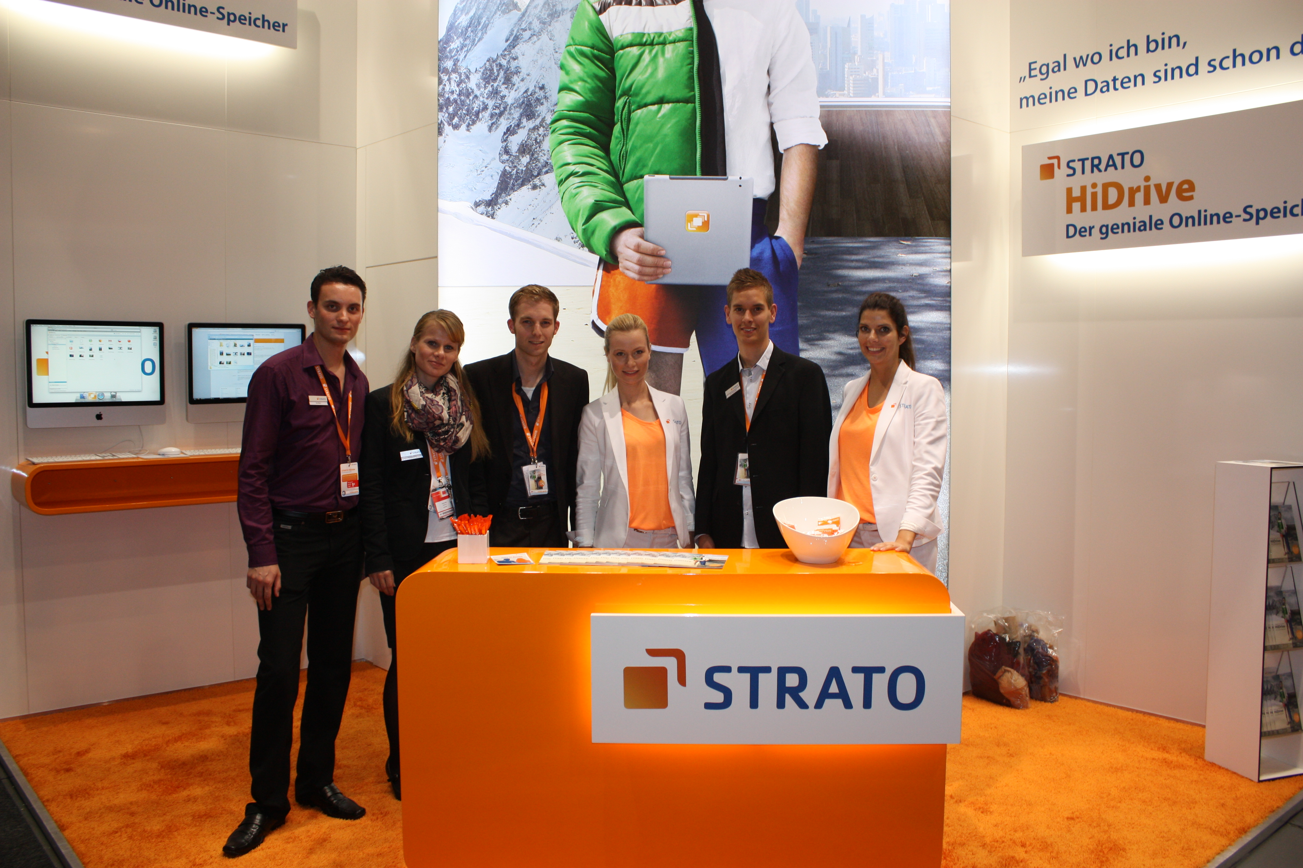 Internationale Funkausstellung 2012, Messeauftritt von Strato